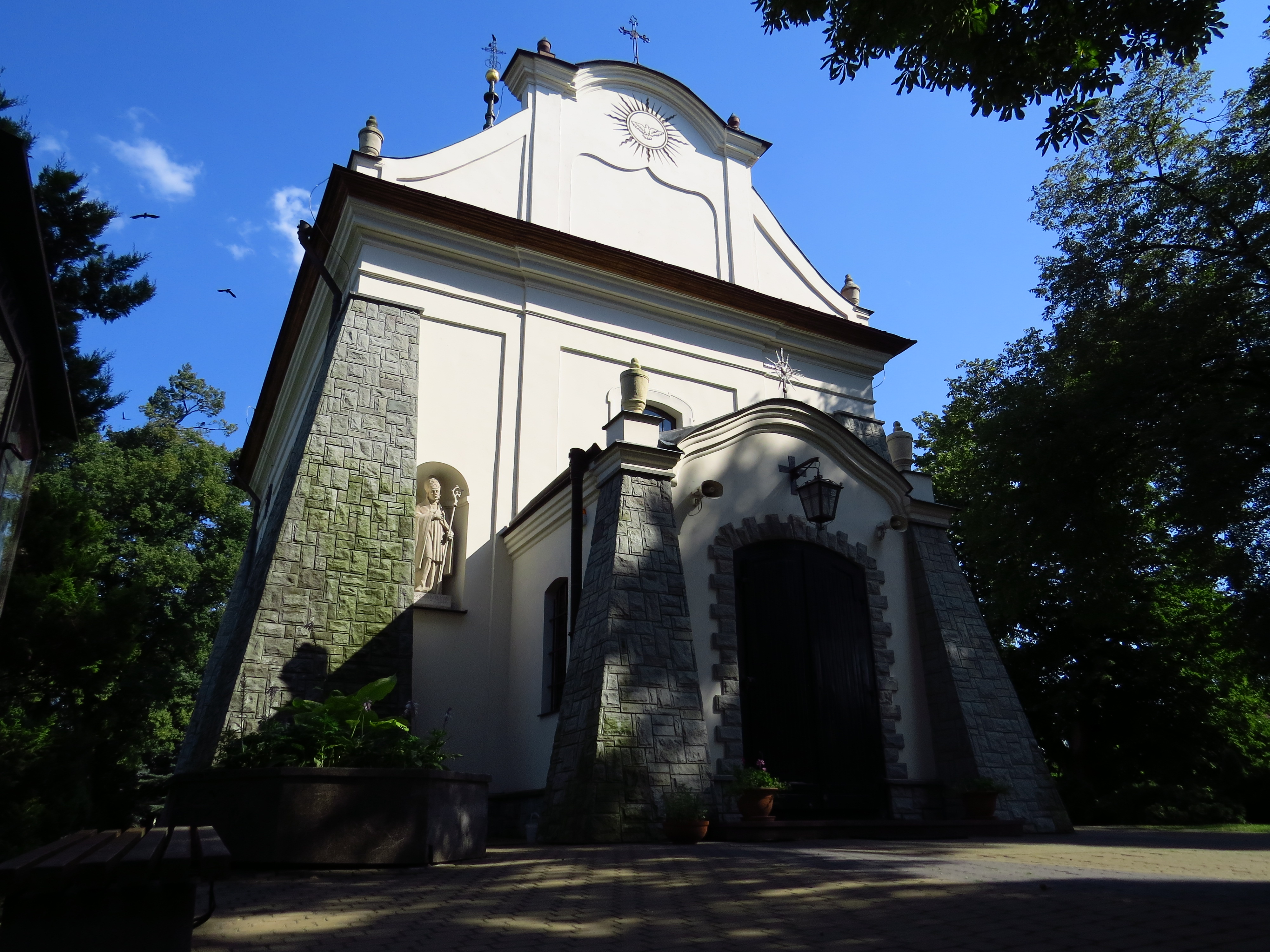 Kraśnik, kościół szpitalny p.w. Św. Ducha, 1758-1761